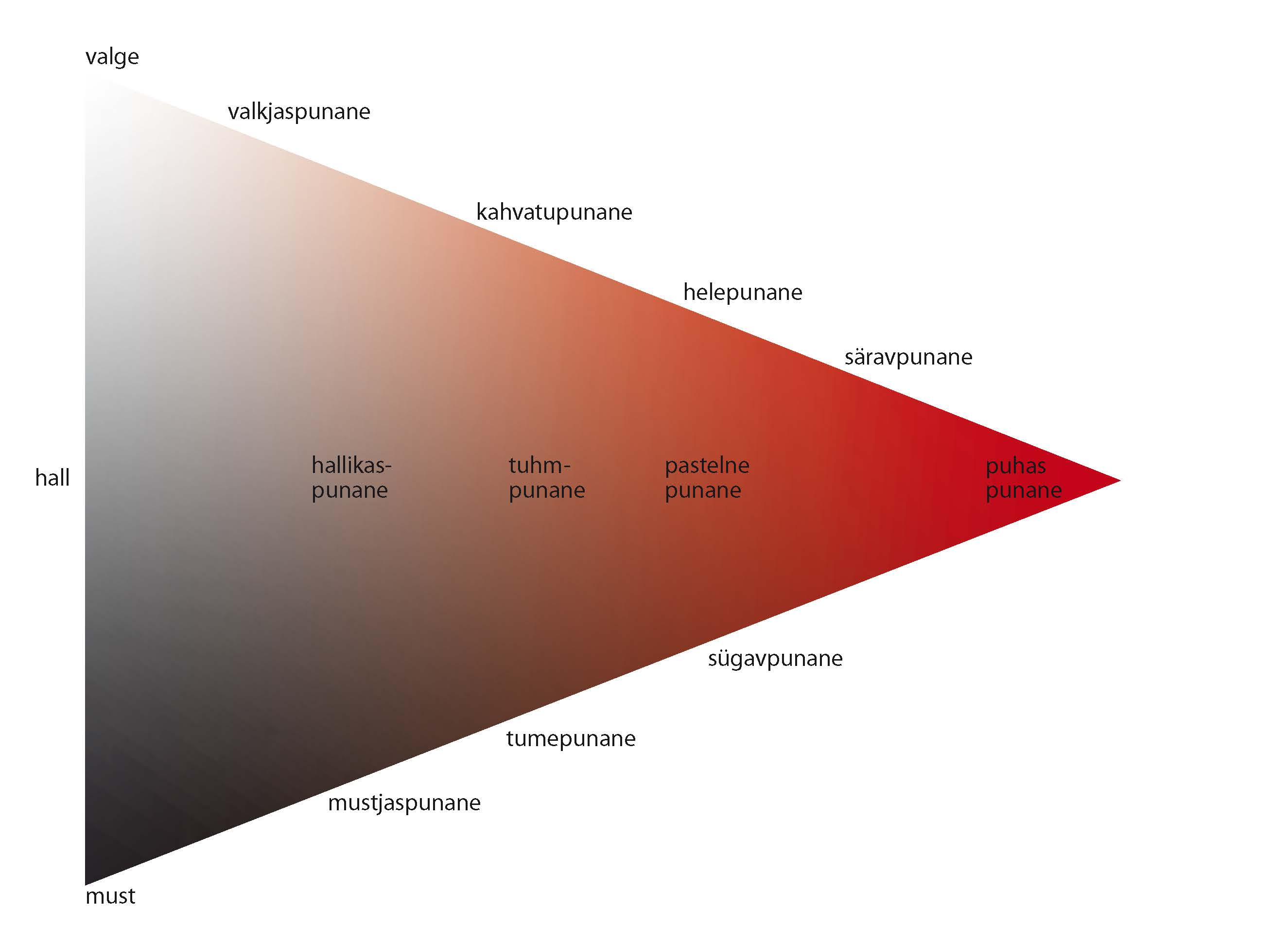 Toonikvaliteeti iseloomustavate omadussõnade ligikaudnepaiknemine heleduse-mustasuse ja kromaatilisuse-akromaatilisuse teljel.